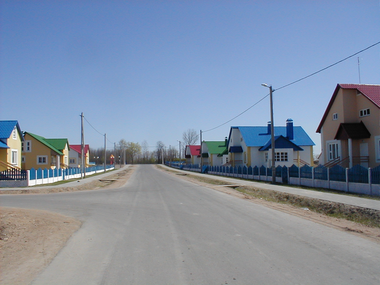 Агрогородок ул.Зелёная